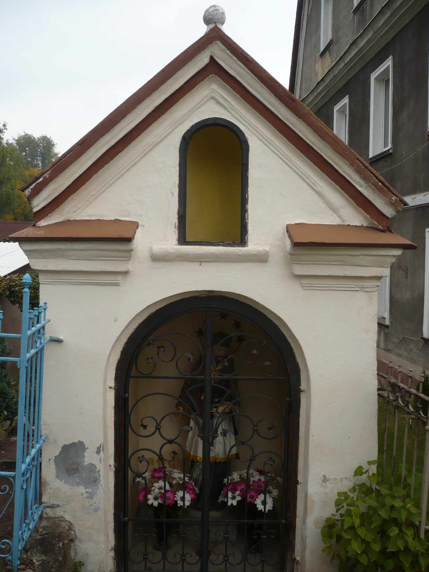 Ludwikowice Kłodzkie. Kaplica przydrożna ze św. Niepomucenem